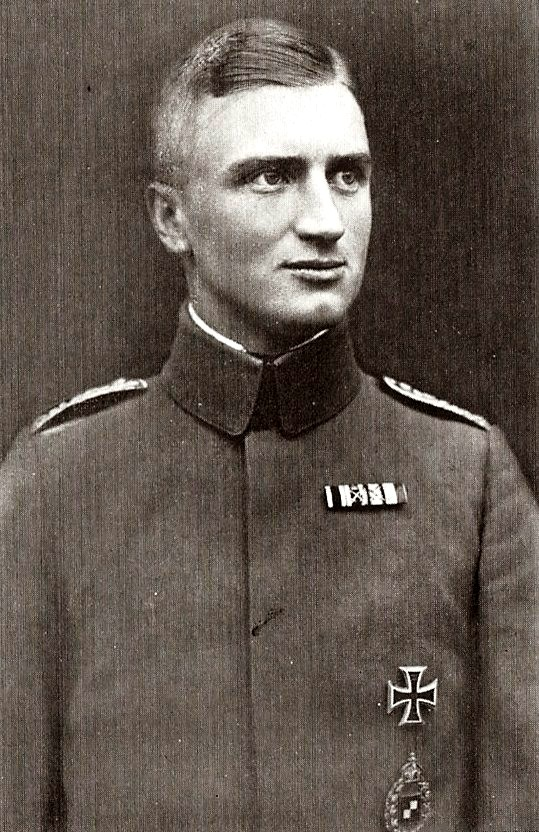 Maximilian von Cossel (1893-1967), Oberst der Luftwaffe; hier abgebildet als Oberleutnant